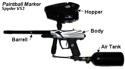 Paintball Marker Diagram